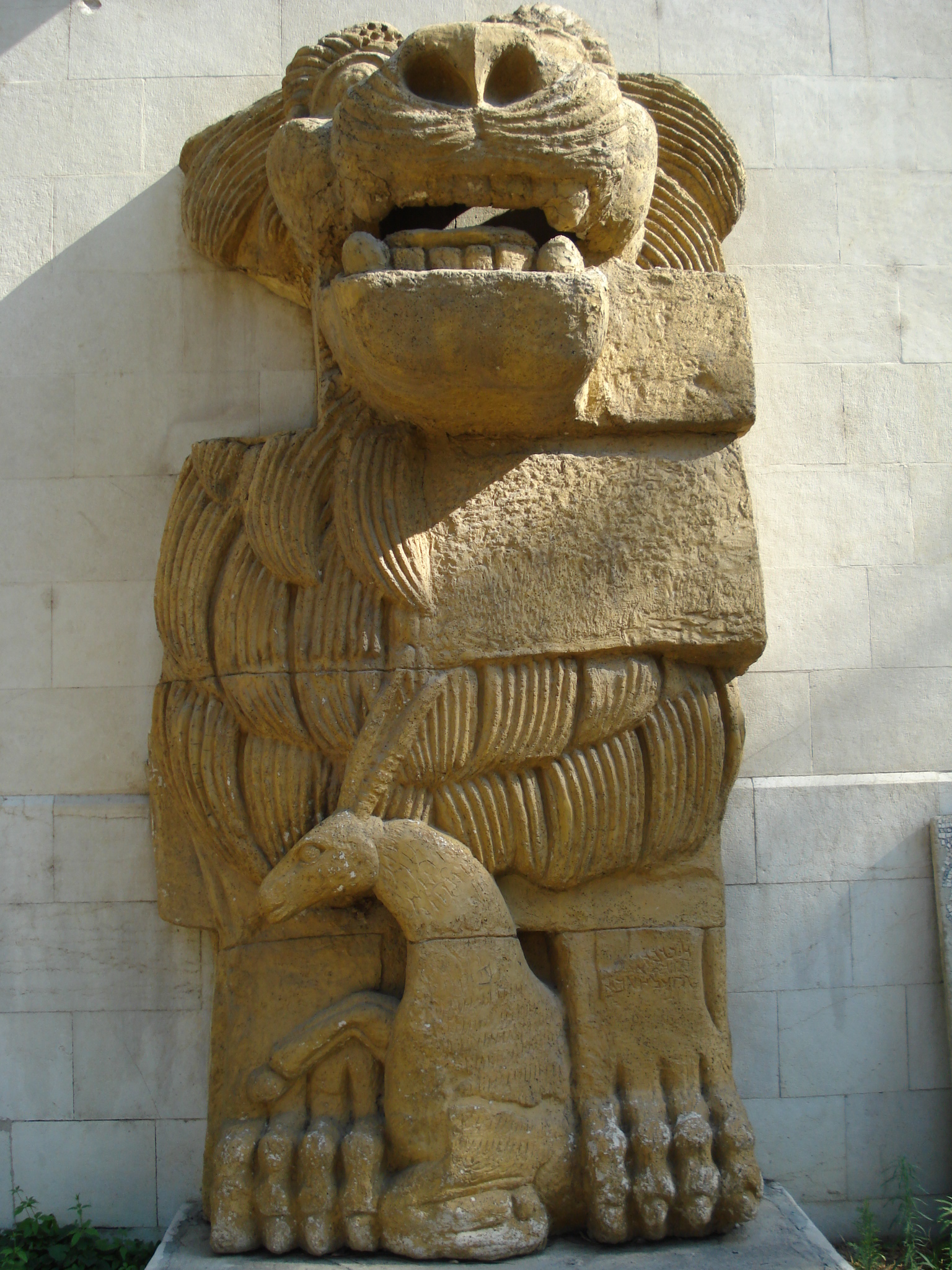 تمثال لأحد الألهة العربية لمرحلة ما قبل الاسلام (اللات) التمثال موضوع على أحد جدران متحف دمشق الوطني في حديقة المتحف